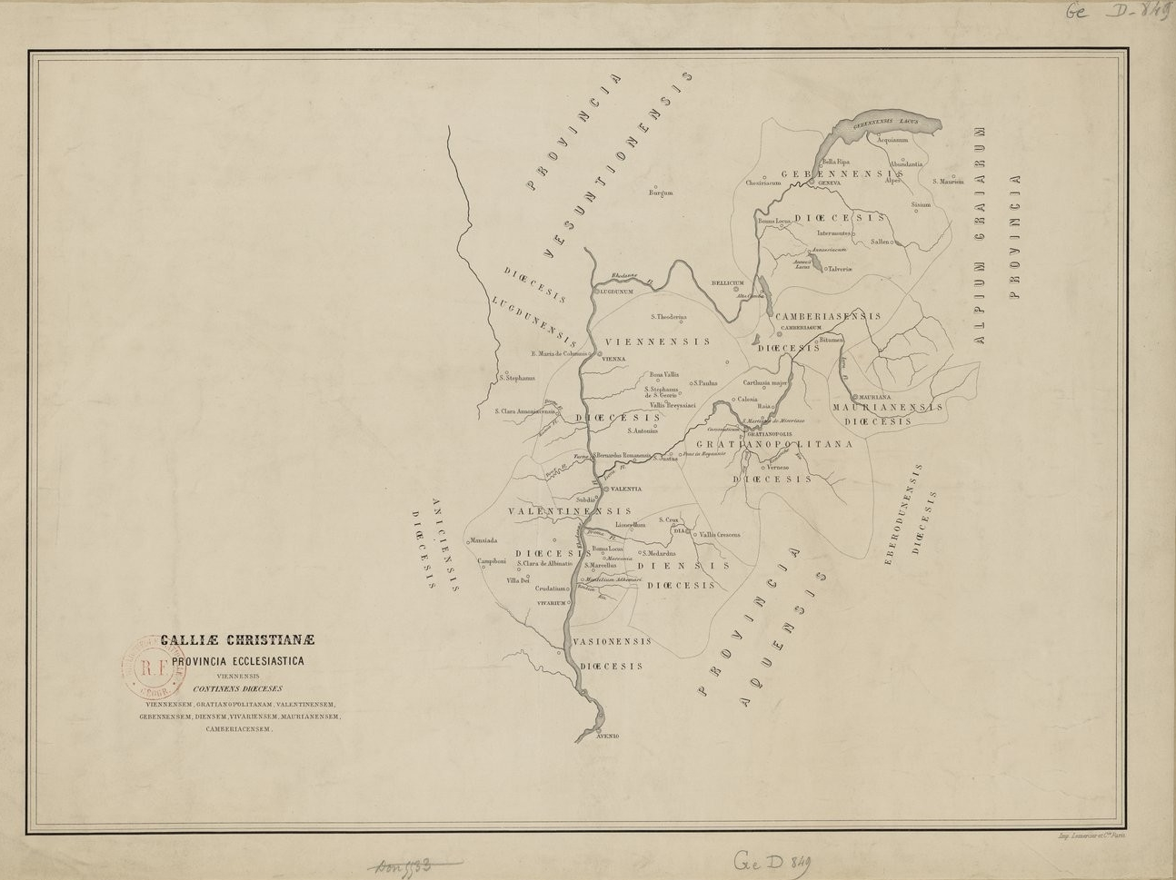 Carte de l'ancienne province ecclésiastique de Vienne, insérée dans la Gallia Christiana (1865).